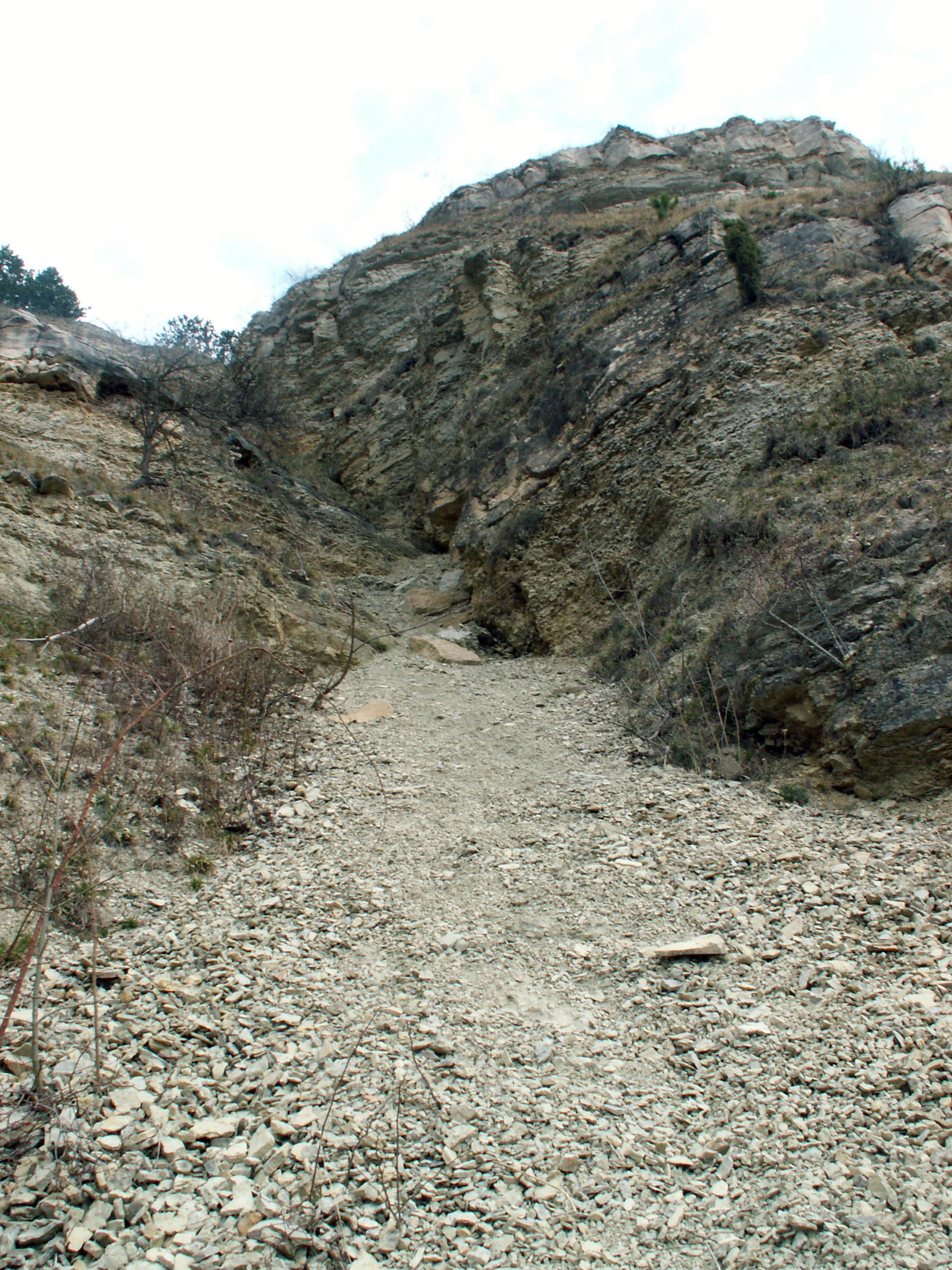 Jena, Hummelsberg, „Studentenrutsche“